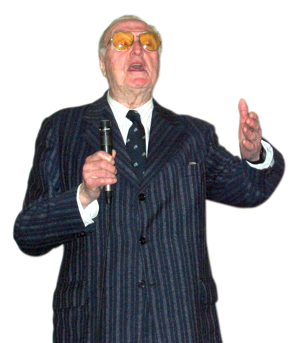 Adolfo Philippeaux habla en el acto de conmemoración de la Reconquista de Buenos Aires, el 12 de agosto de 2004.